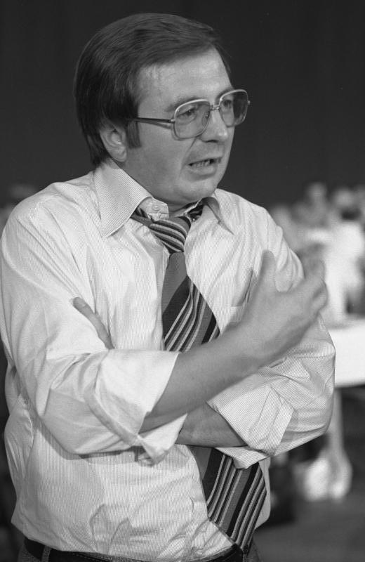 Außerordentlicher Parteitag der SPD in der Westfalenhalle Dortmund